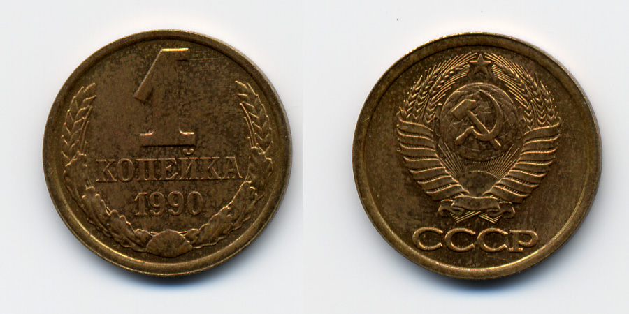 1 копейка СССР